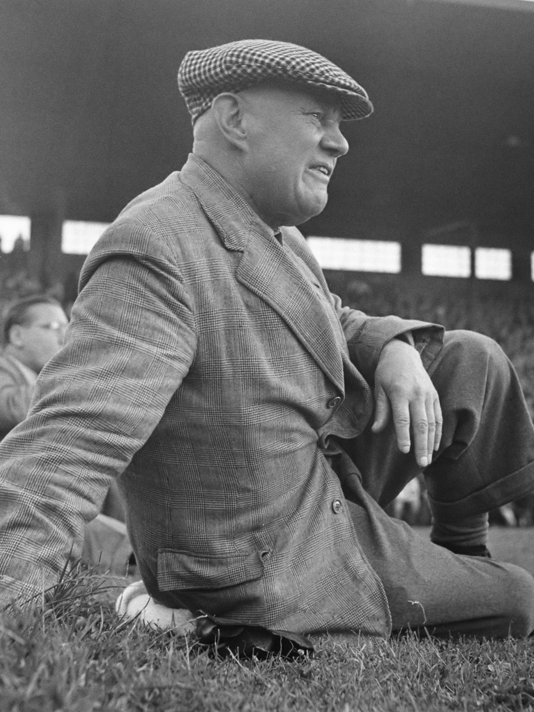 Jack Reijnolds 3 juli 1947